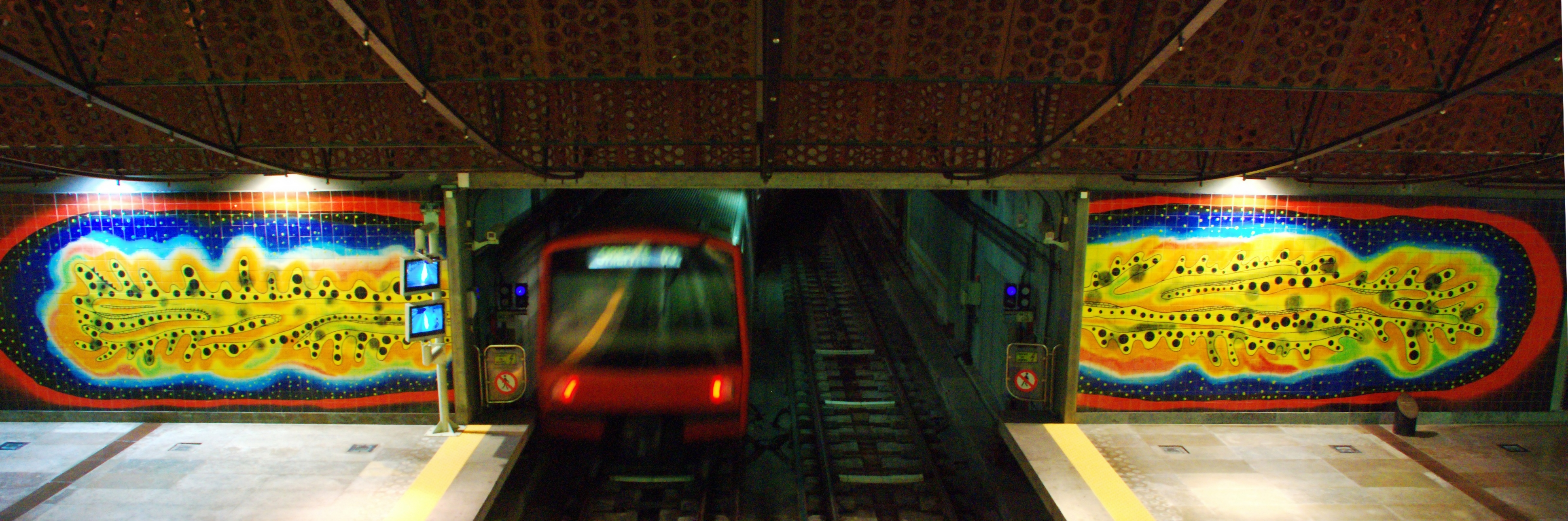 Nivel inferior de la Estación de Oriente, donde termina la "linha vermelha" del metro de Lisboa. Está decorada con grandes murales sobre mosaicos de artistas internacionales.